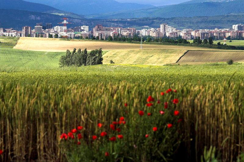 iruñea